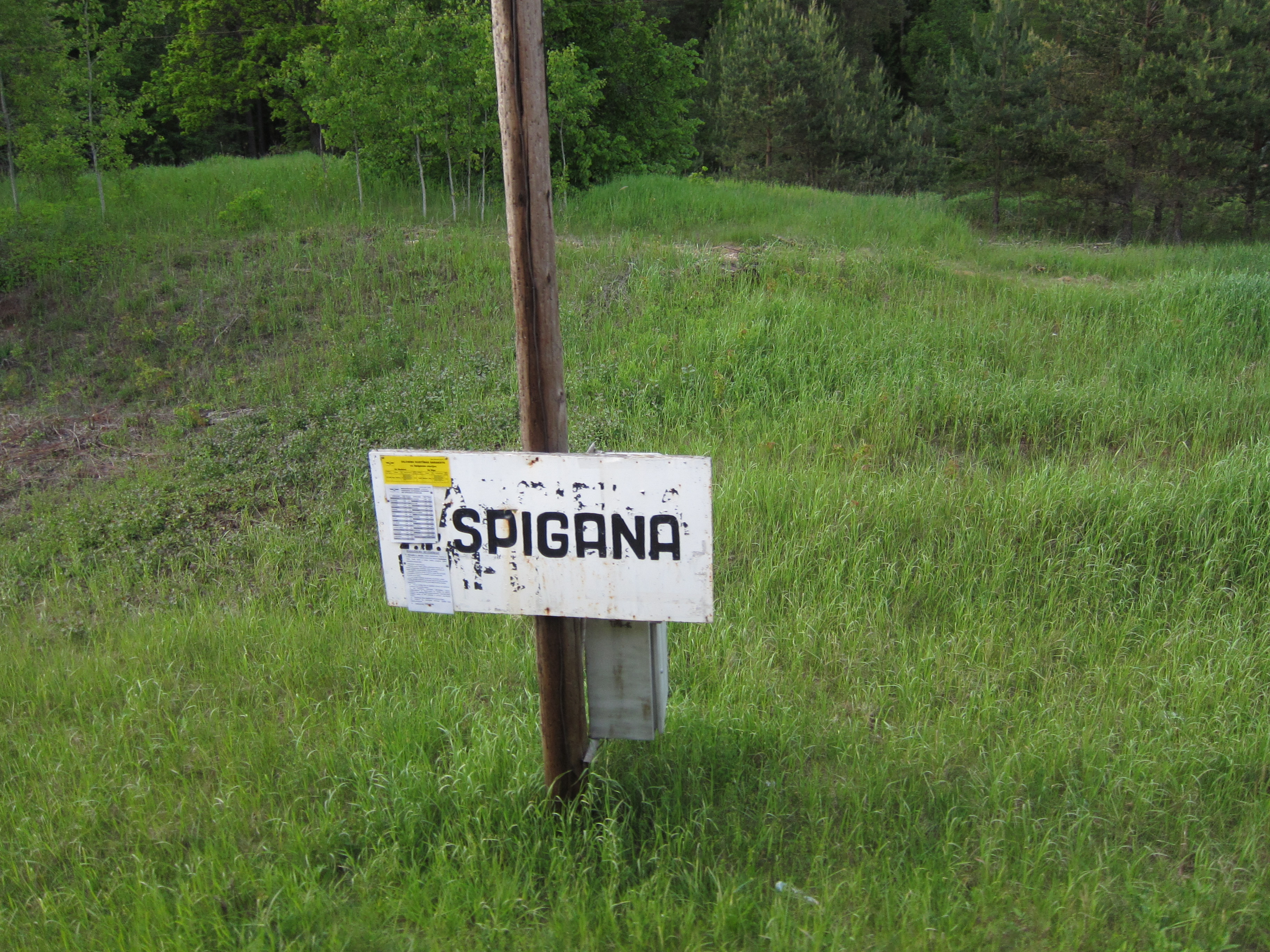 Spīganas pieturas plāksnīte ar vilcienu sarakstu.